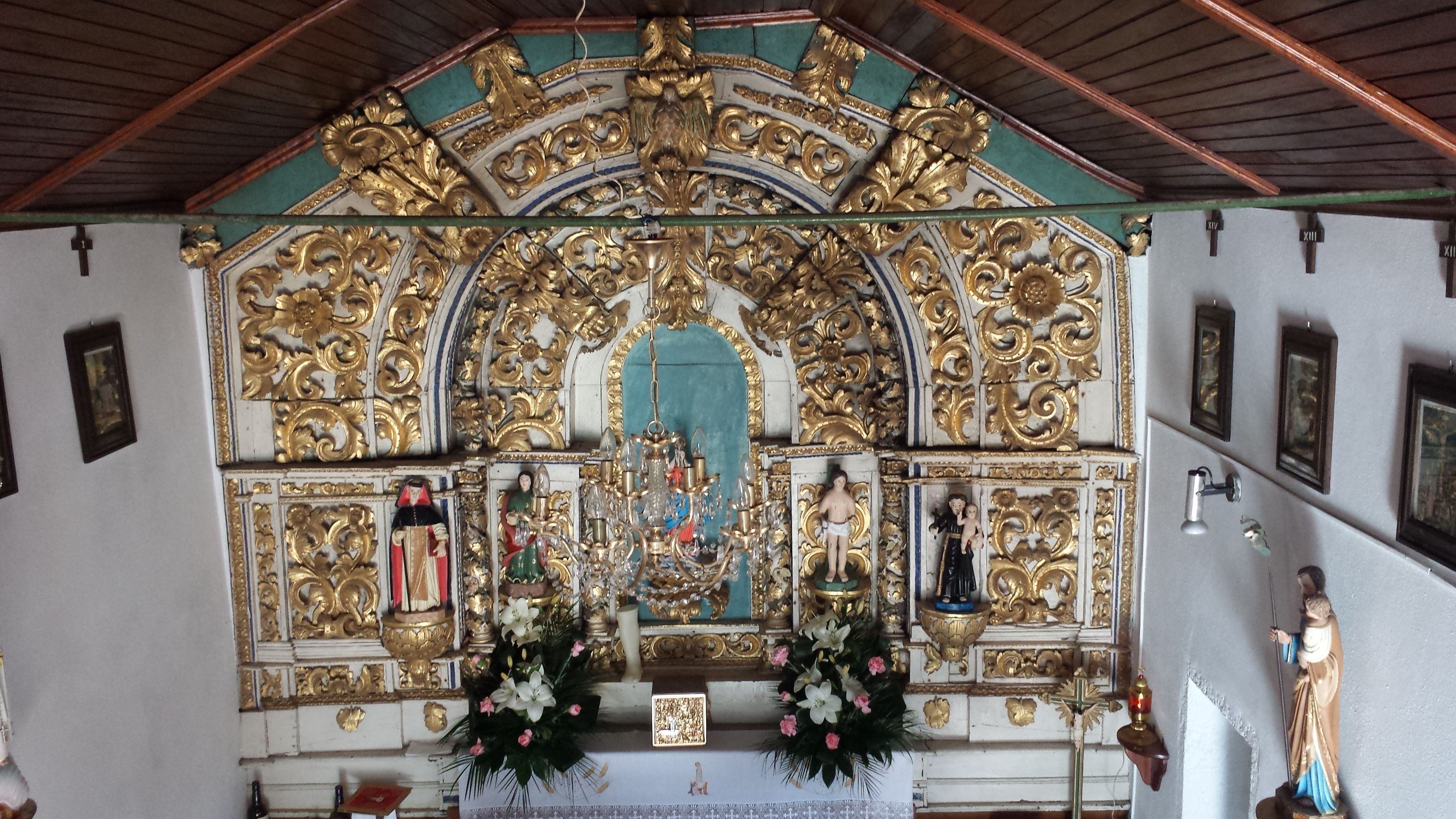 Altar Capela da N Senhora Saude